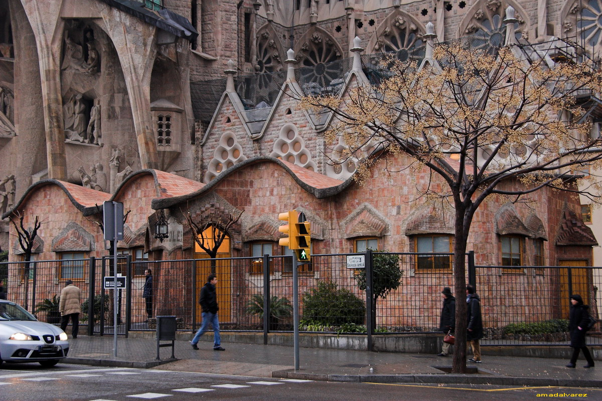 Escoles Sgda. Familia al C/ Sardenya (Barcelona-Catalunya), obra de Antoni Gaudi 1905.